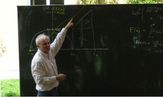 Wolfgang Mückenheim, Mathematiker und Physiker an der Hochschule Augsburg